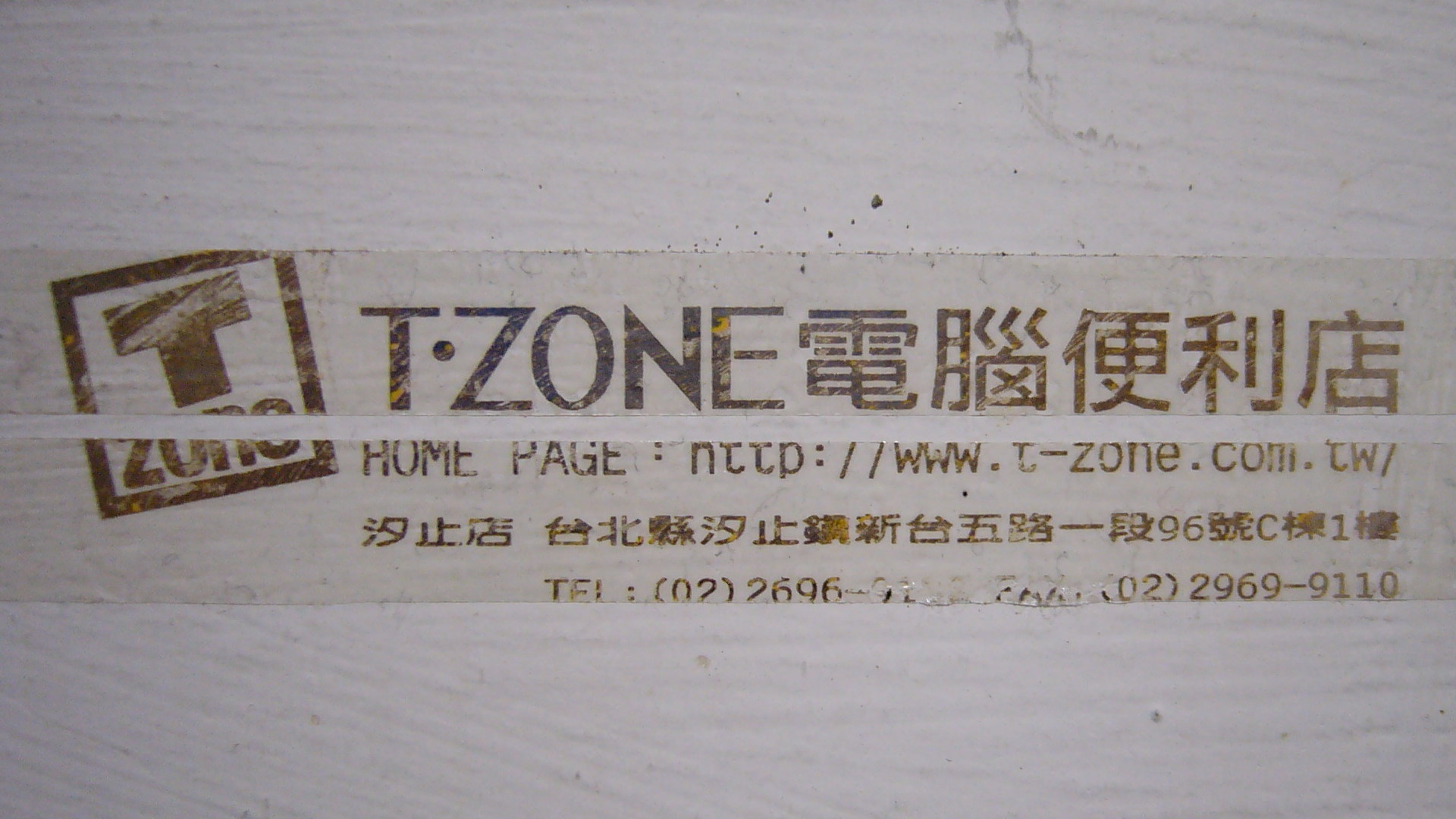 已不存在的太電欣榮實業「T-Zone電腦便利店」商標與中文標準字。下方是T-Zone電腦便利店汐止店的地址與電話號碼，地址為臺北縣汐止鎮東方科學園區C棟1樓。